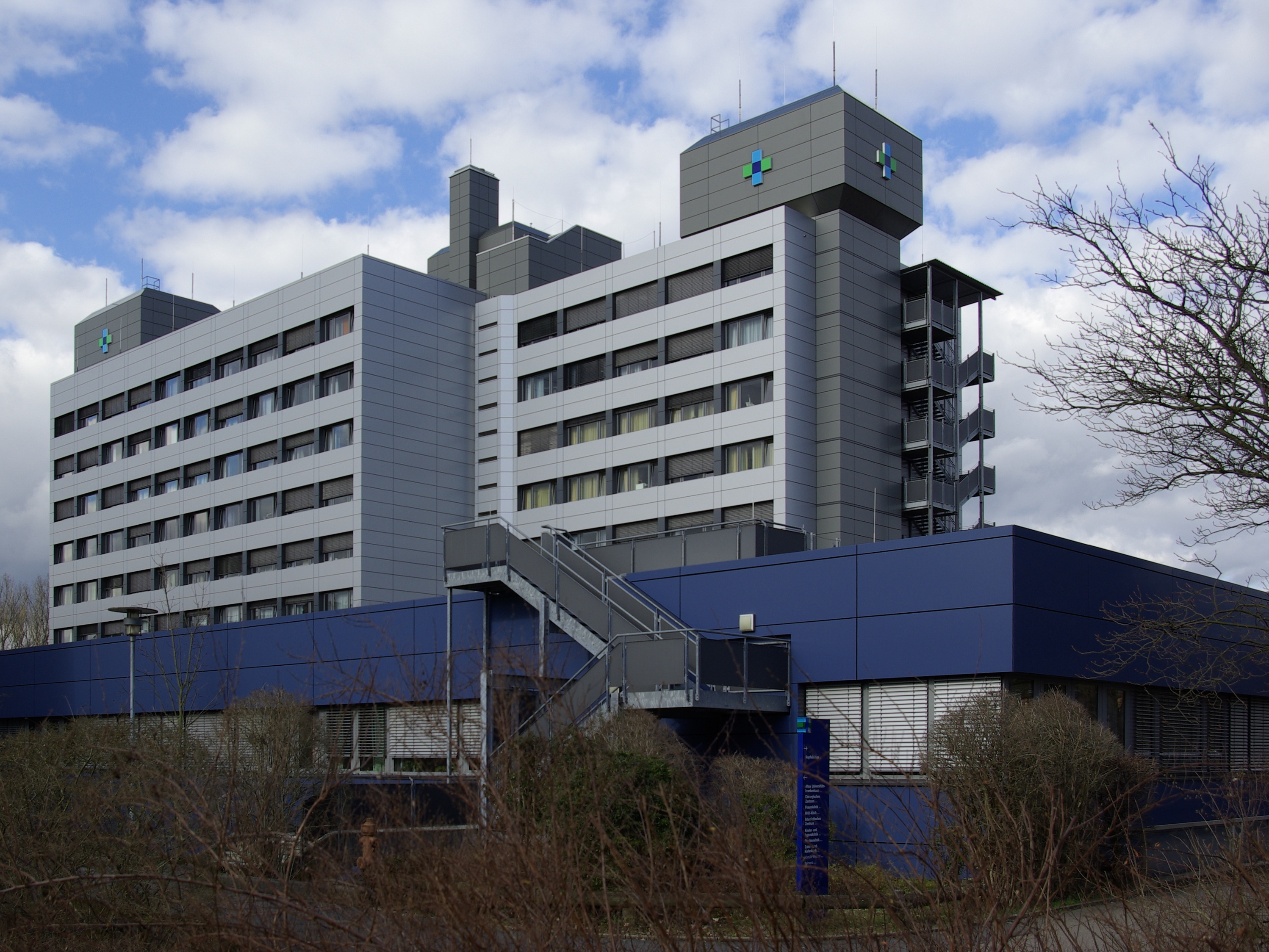 Kopfkliniken des Universitätsklinikums Erlangen